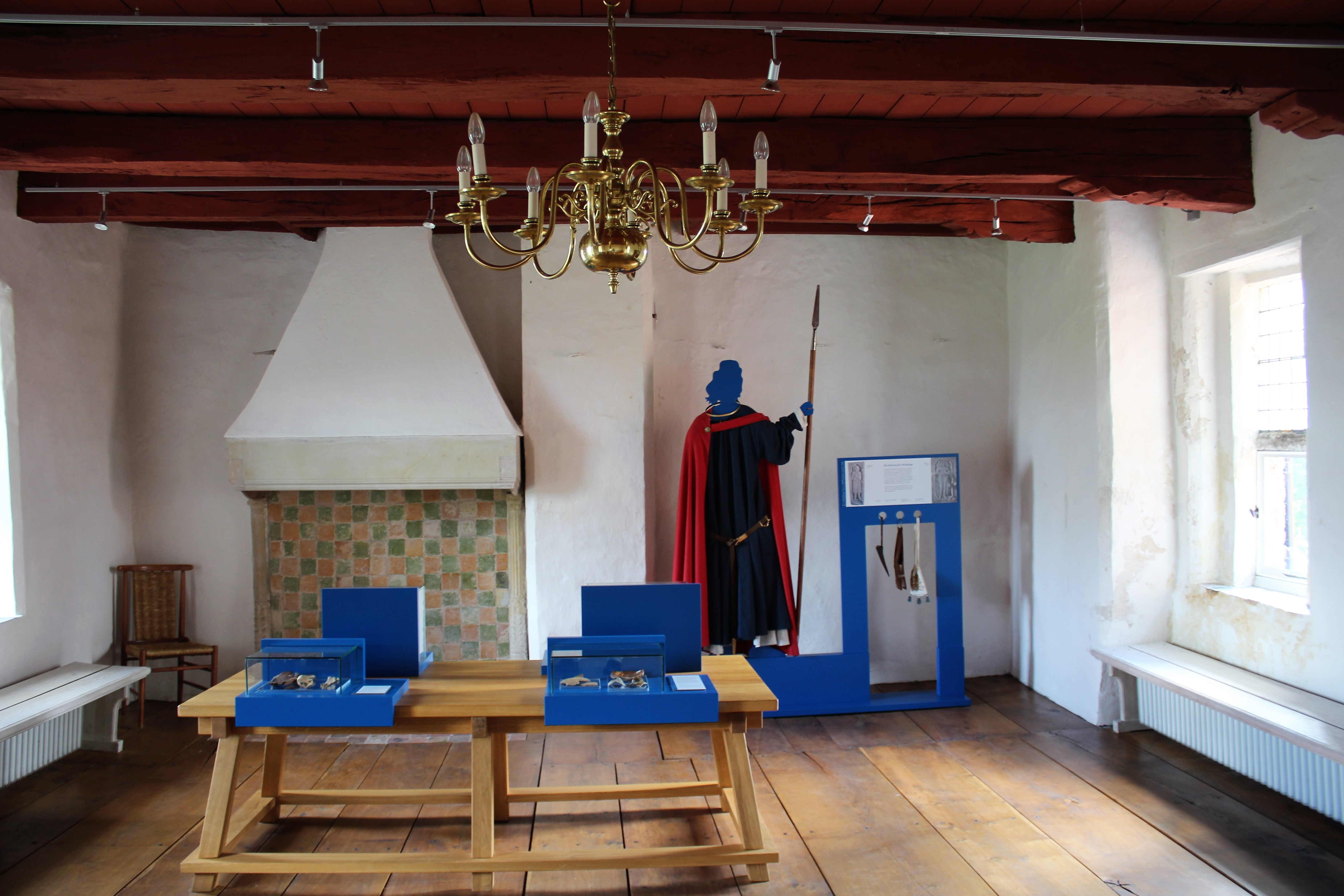 Steinhaus Bunderhee, Landkreis Leer, Ostfriesland, Deutschland